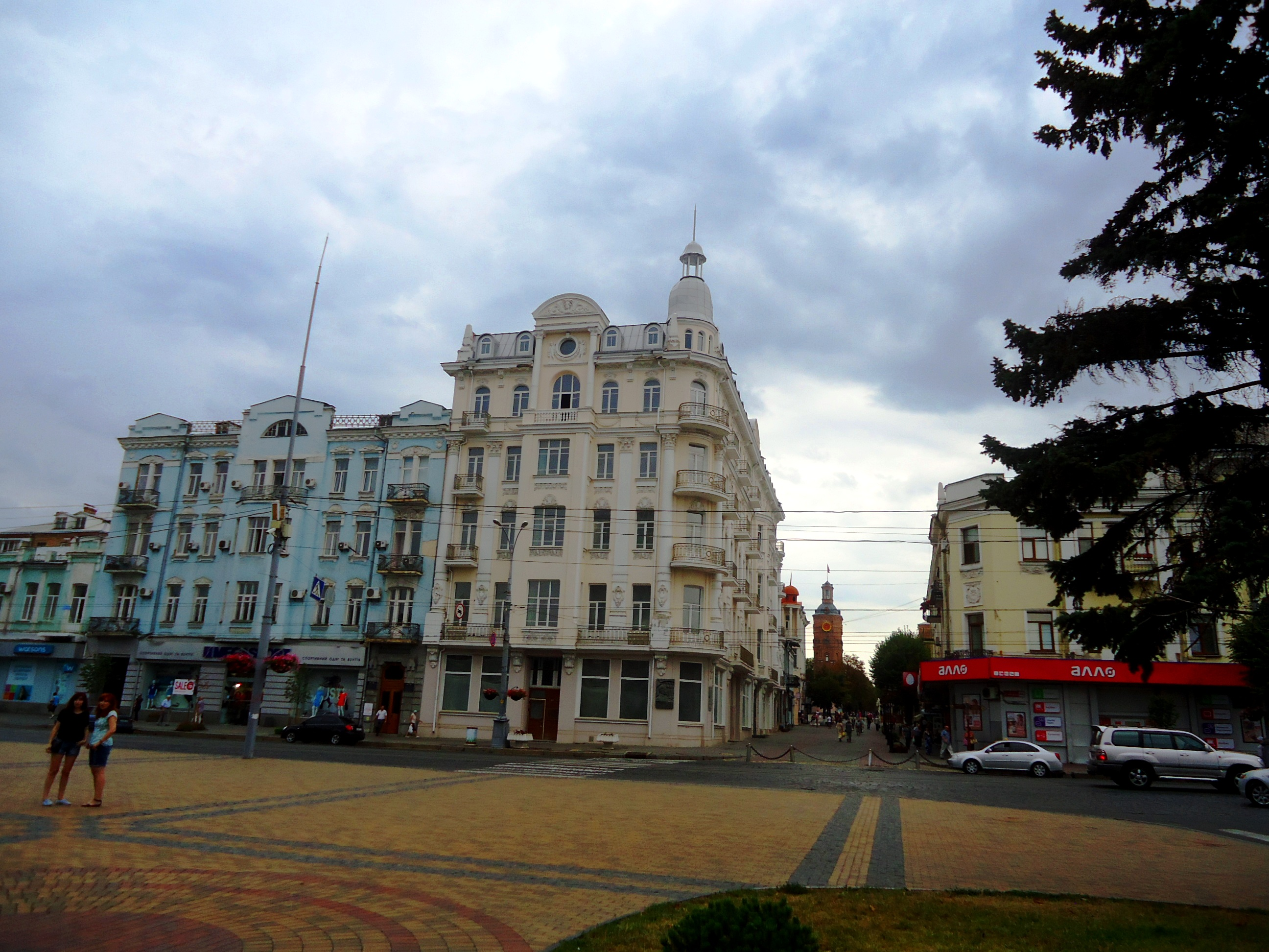 Готель «Савой», Вінниця, вул. Козицького, 36